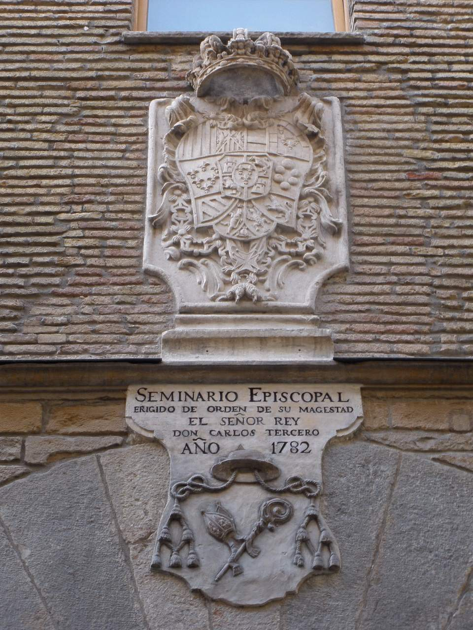 Albergue de Peregrinos de Pamplona